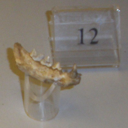 Fossil of Felis lunensis, an extinct mammal - Took the picture at Museo di Paleontologia di Firenze